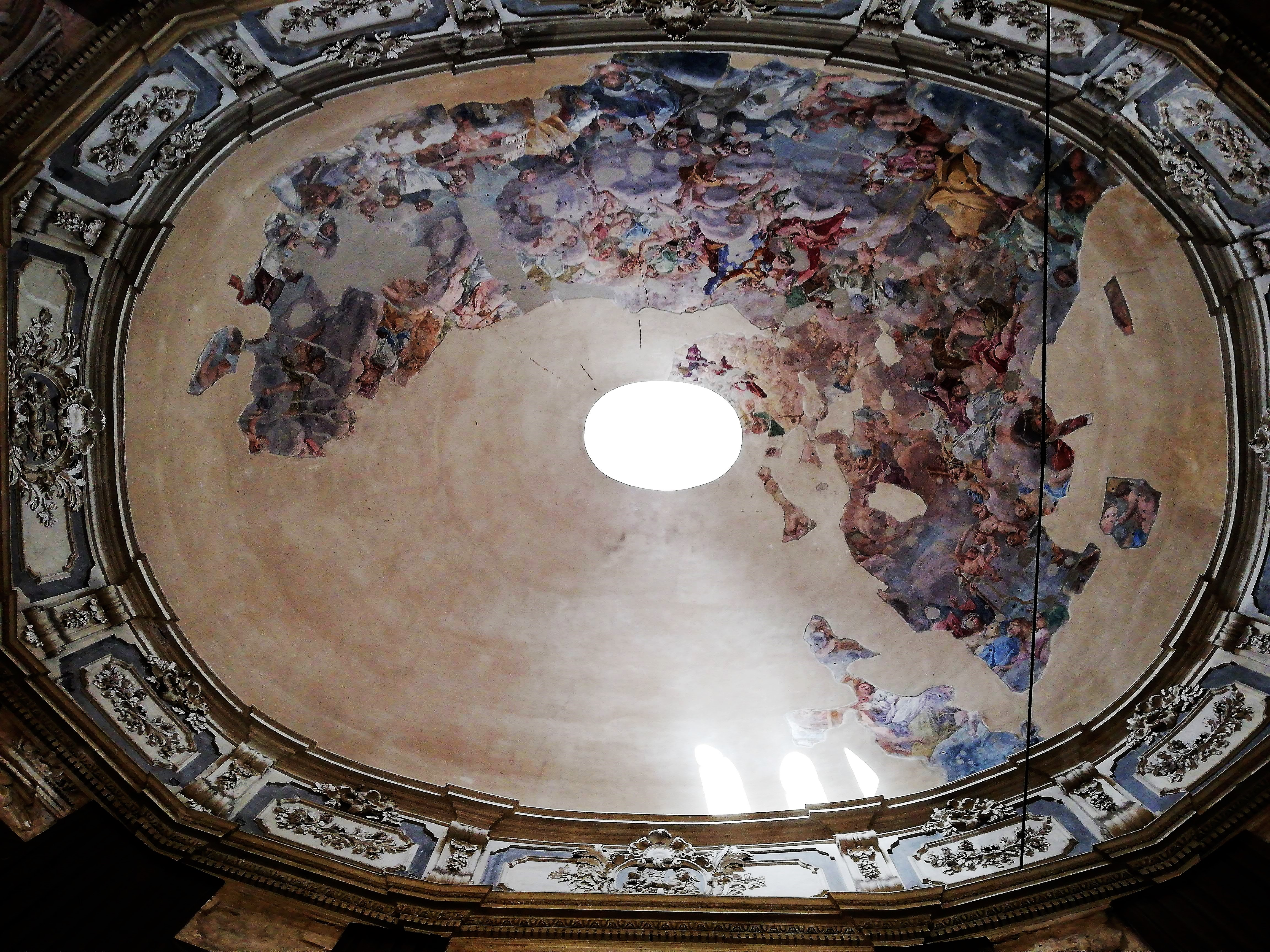 Cupola elissoidale.